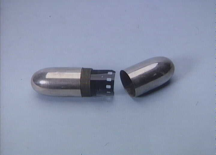 Anus-patron brugt af kurer til opbevaring af illegale mikrofilm under transport til Sverige